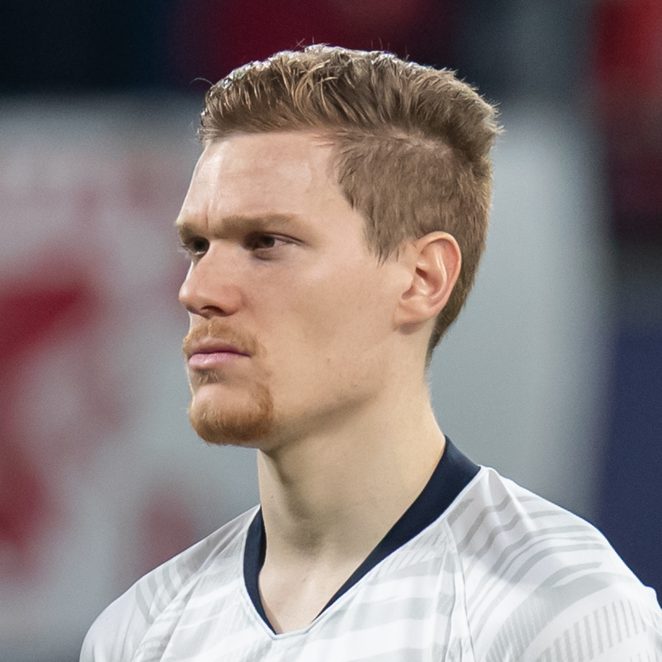 Fußball, Männer, UEFA Champions League Achtelfinale, RB Leipzig - Tottenham Hotspur; Marcel Halstenberg (RB Leipzig, 23)